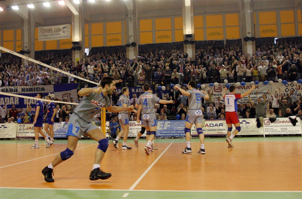 Jadar Radom - 2006